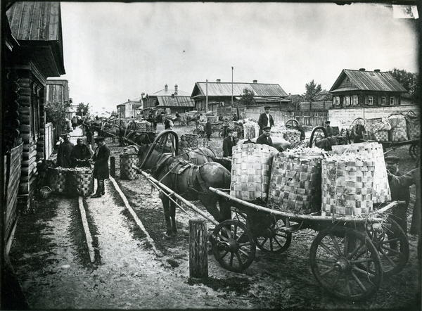 Ложкарный базар в городе Семенове